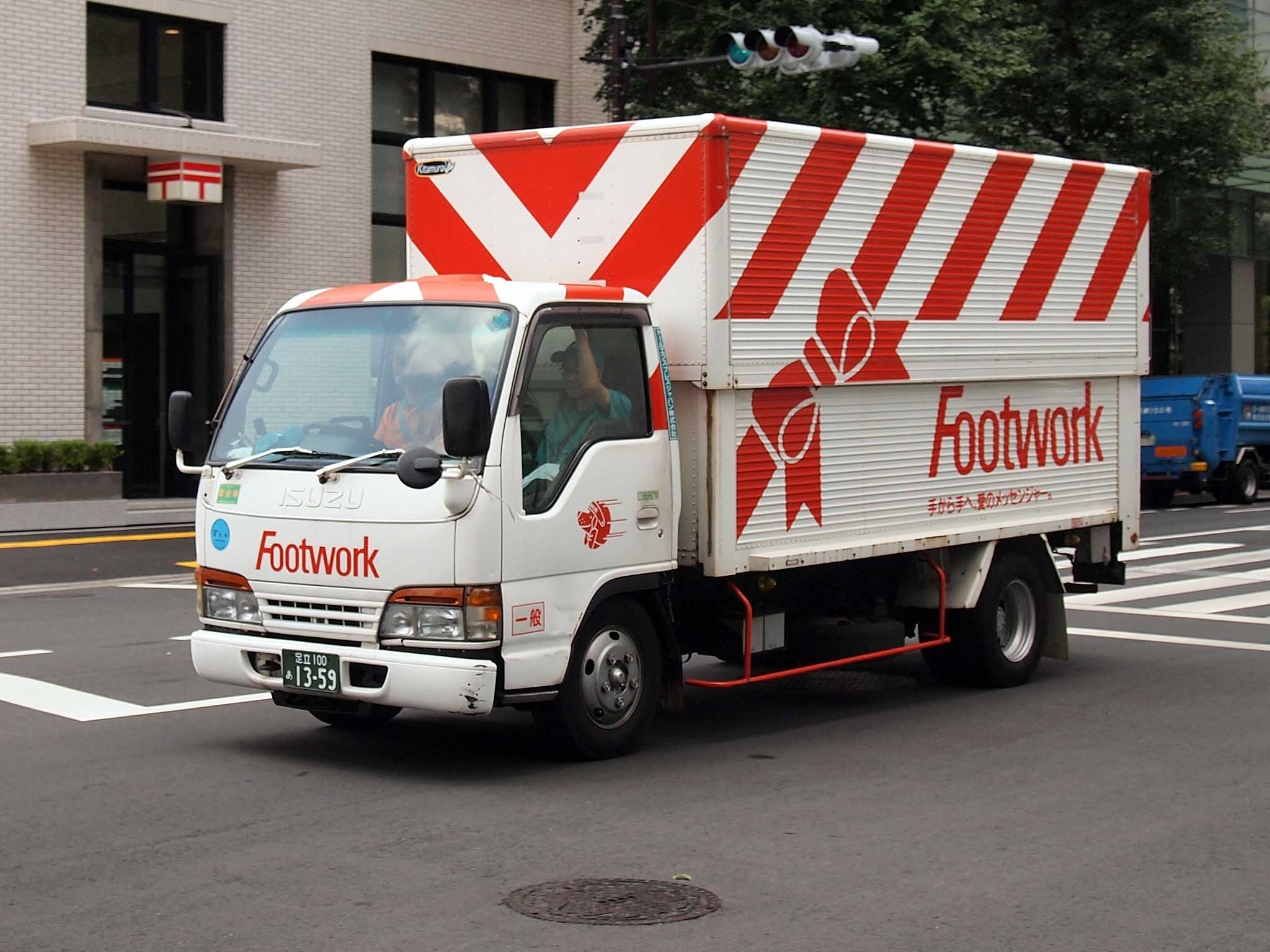 トールエクスプレスジャパンのトラックの一例：フットワークエクスプレス時代のカラーリングが残る旧年式車。荷台は北村製作所「リンボーバン」を架装。